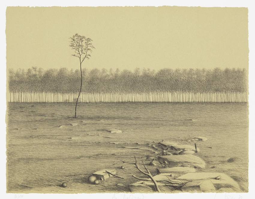 Ev Grüger - Am Waldrand, 1978, Offsetlithografie©Estate Ev GrügerGrüger